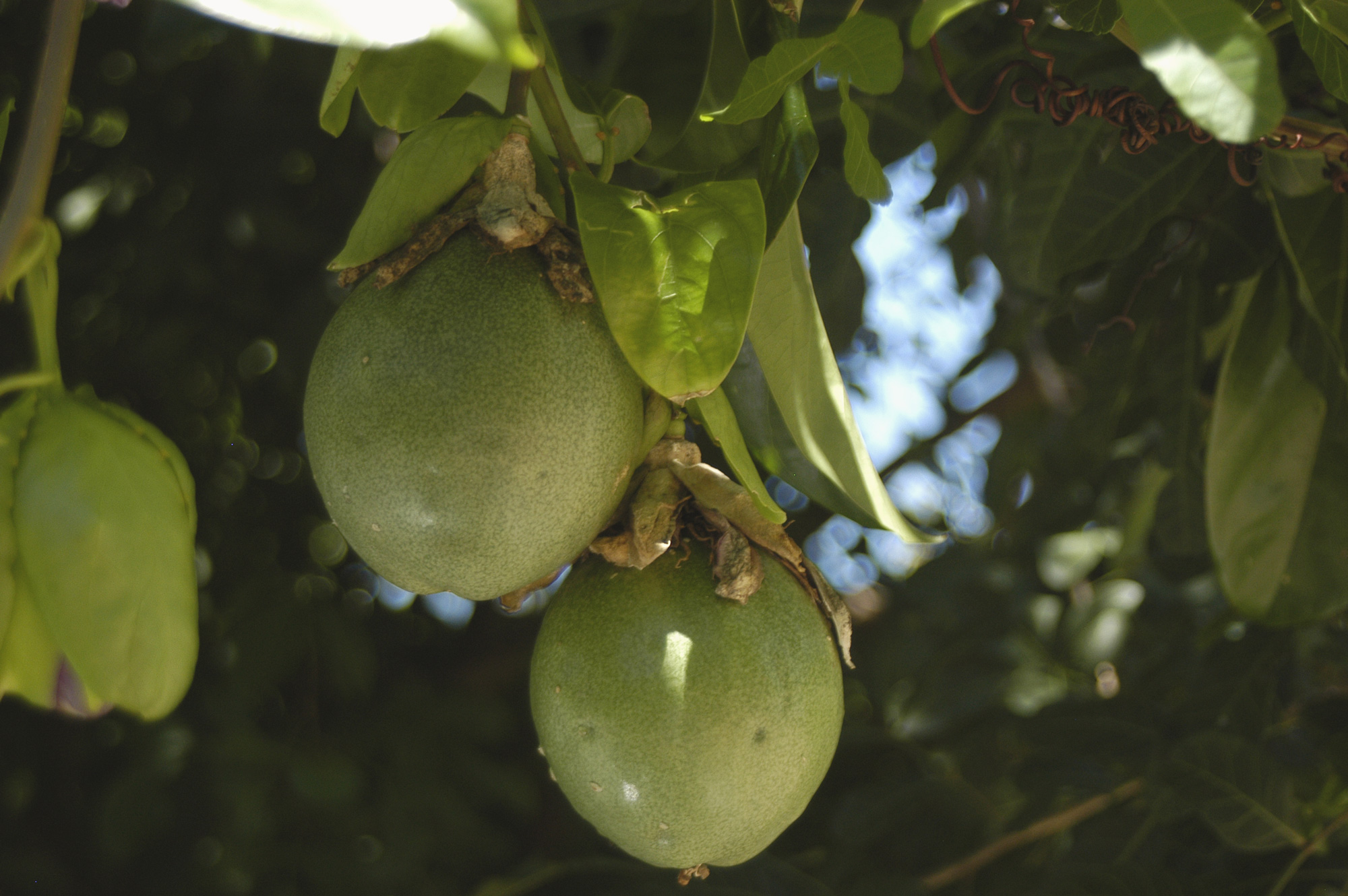 Passiflora alata (fruto)